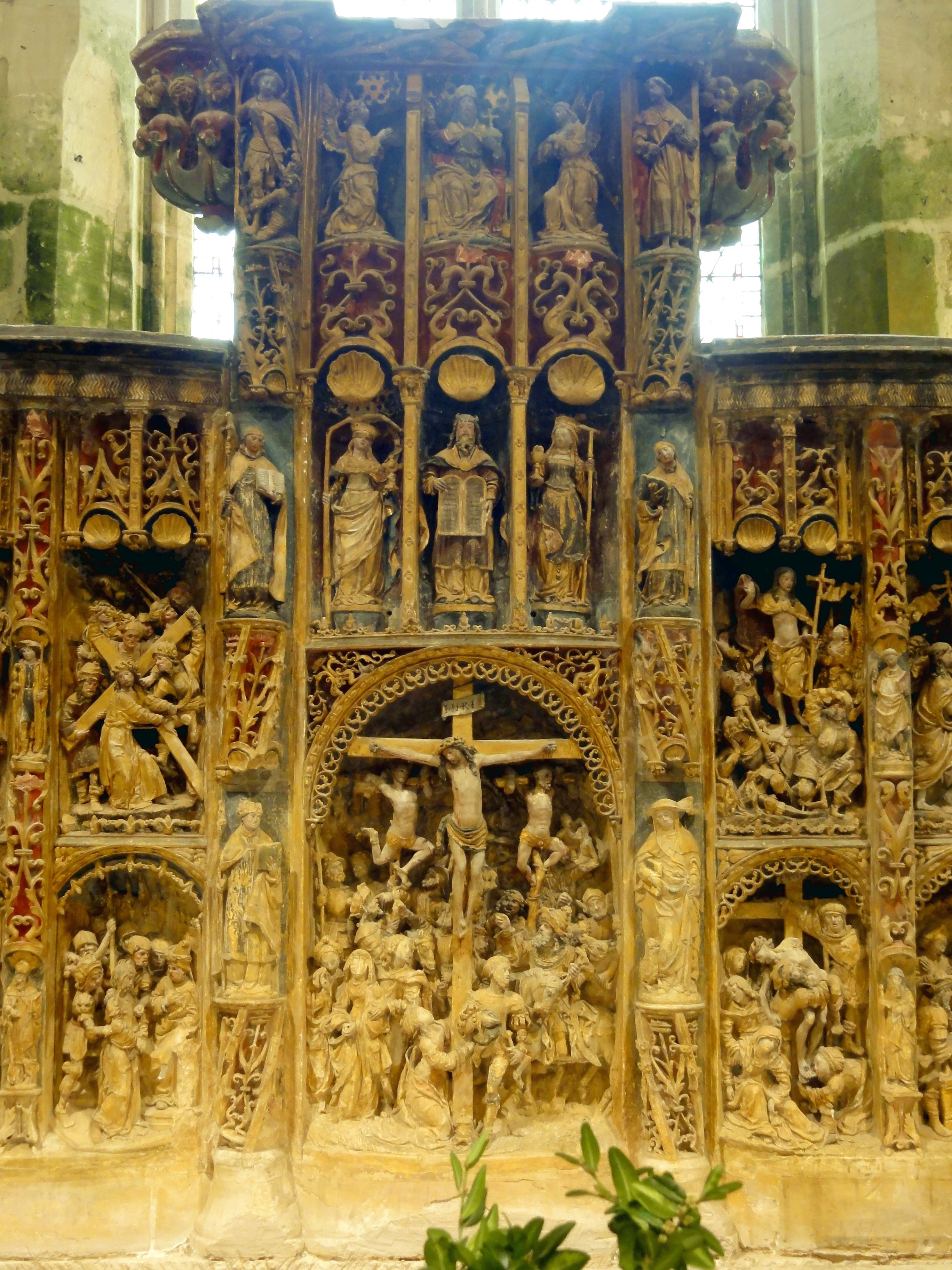 Retable de Nucourt - voir titre.